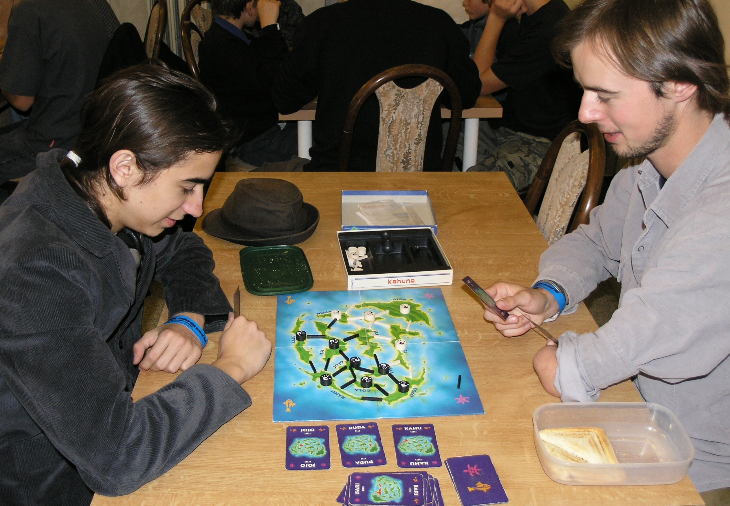 Česky: Deskohraní 2008